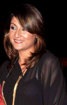 Anju Mahendroo, Urvashi Dholakia at Mushtaq Sheikh's birthday bash